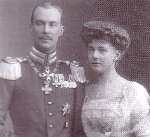 Prinz Friedrich Wilhelm von Preußen (1880-1925) und seine Frau Agathe geb. Prinzessin Ratibor